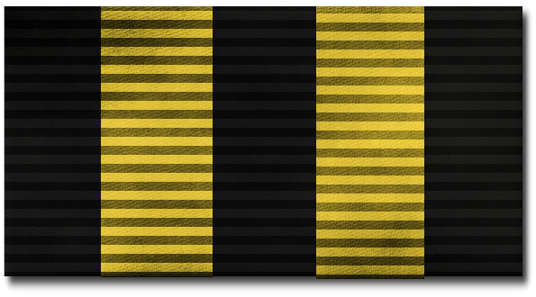 Suomen väestönsuojelun ansiomitalin nauha.